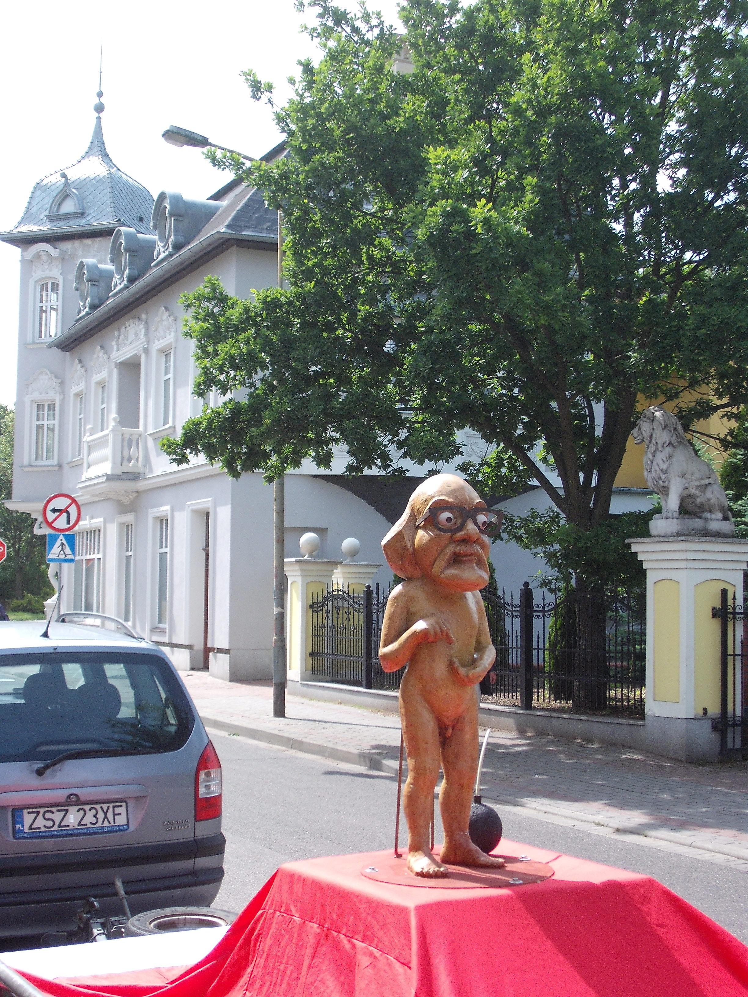 Obywatel Włapko - happening w Szczecinku